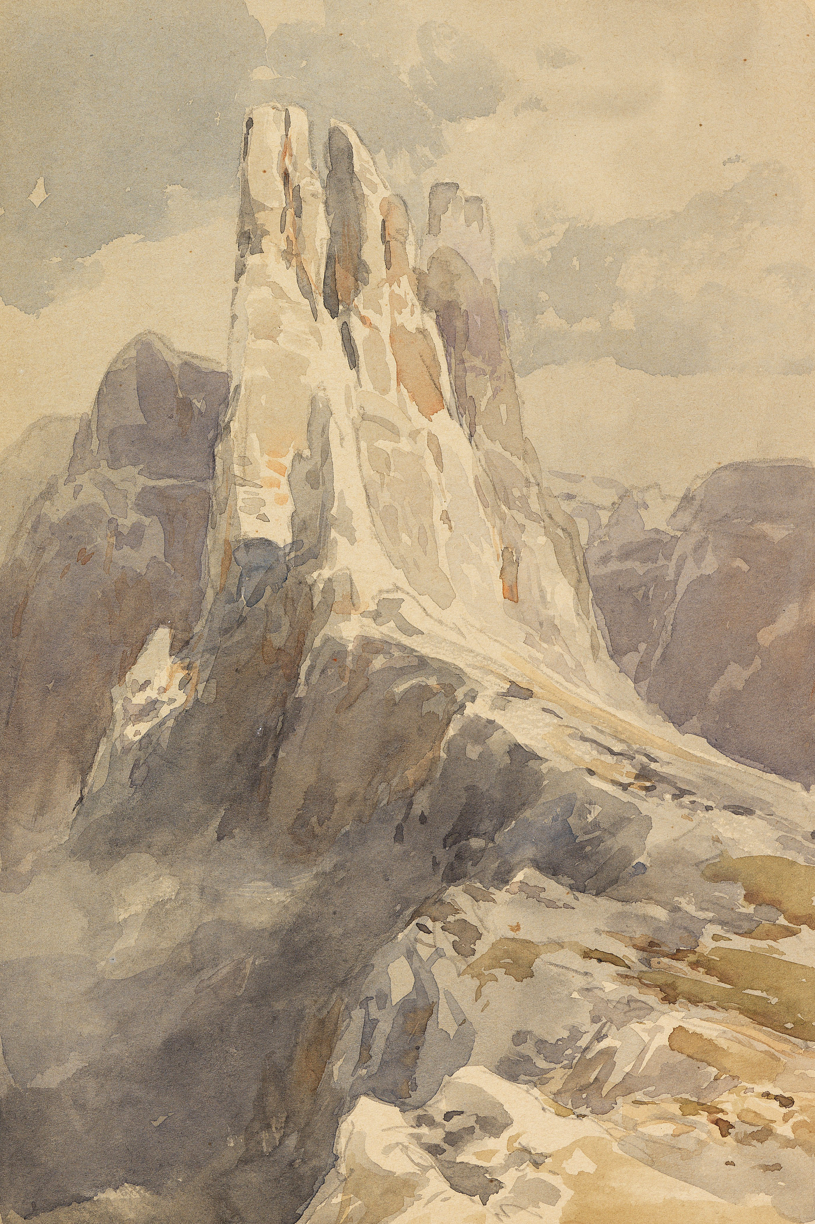 Blick auf die Vajolet-Türme in den Dolomiten. Um 1905. Aquarell über Bleistift. 21,9 x 14,6 cm. Verso Bleistiftskizze einer Dorfansicht. Vermutlich Vorstudie für das Gemälde "Türme von Vajolet" (heute Alpenverein-Museum des ÖAV, Innsbruck).